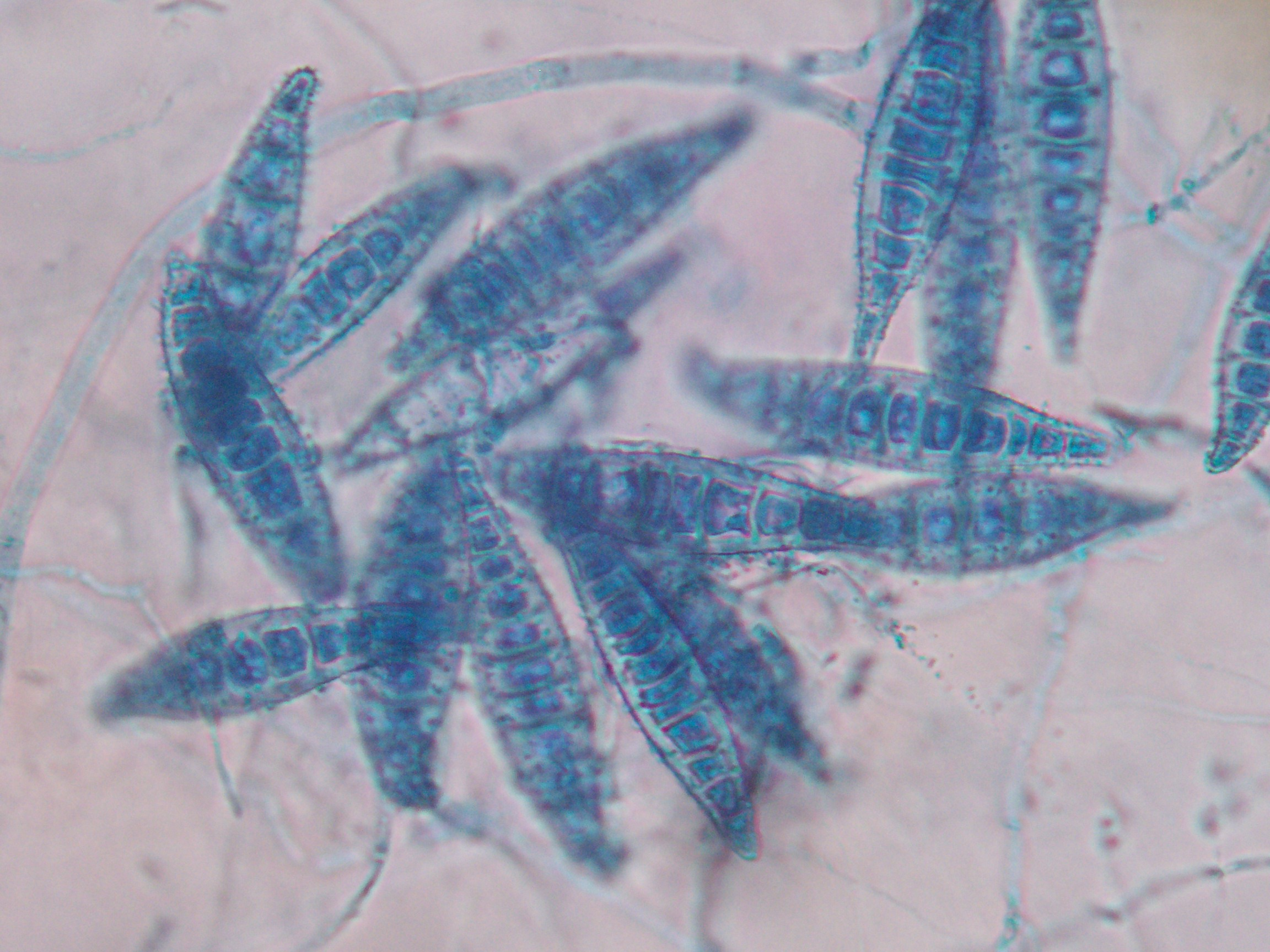 40x Macroconidia de Microsporum canis